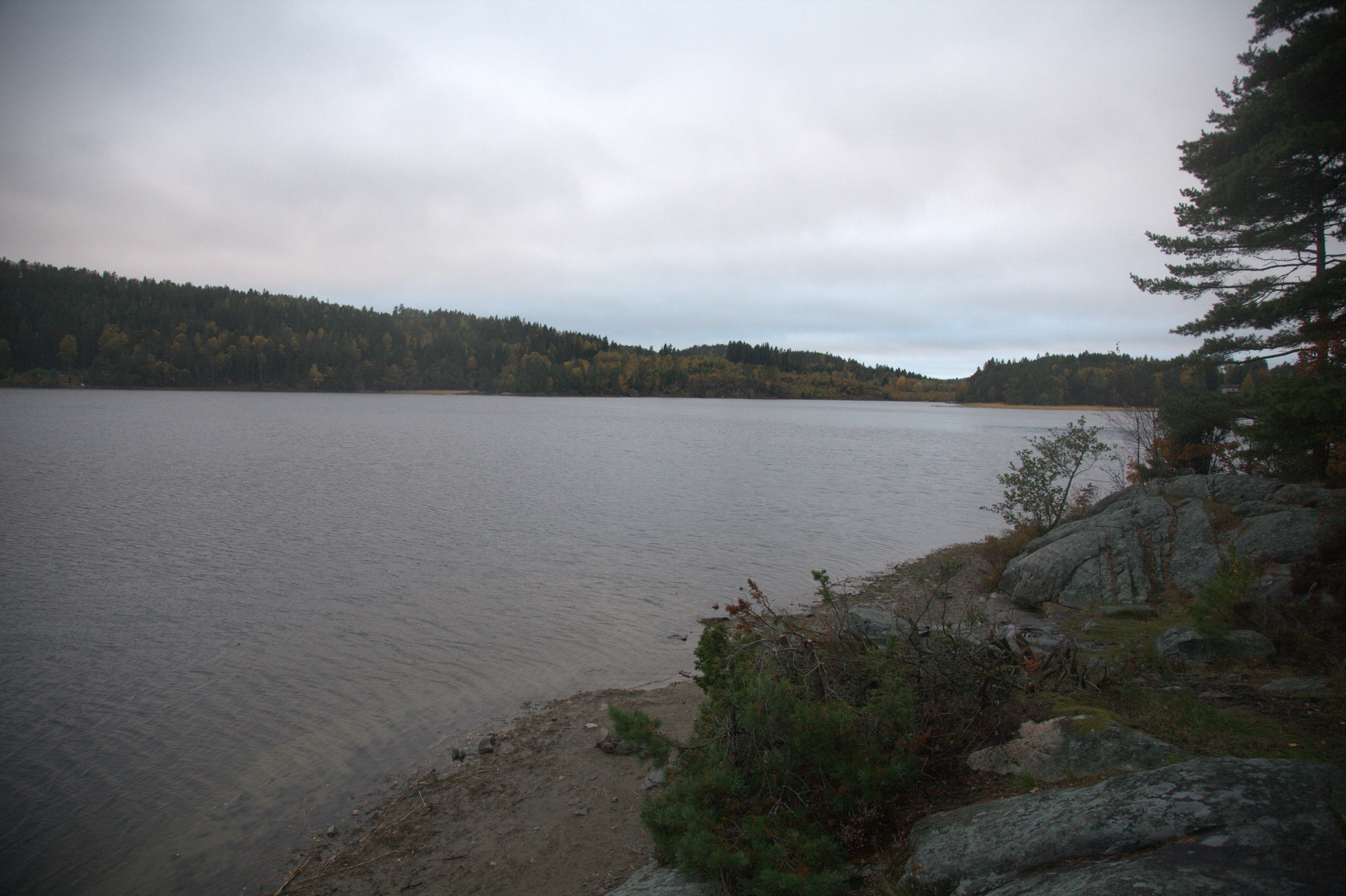 Ålevatten i Stenungsunds kommun. Vy västerut från rastplatsen på sjöns norra sida.